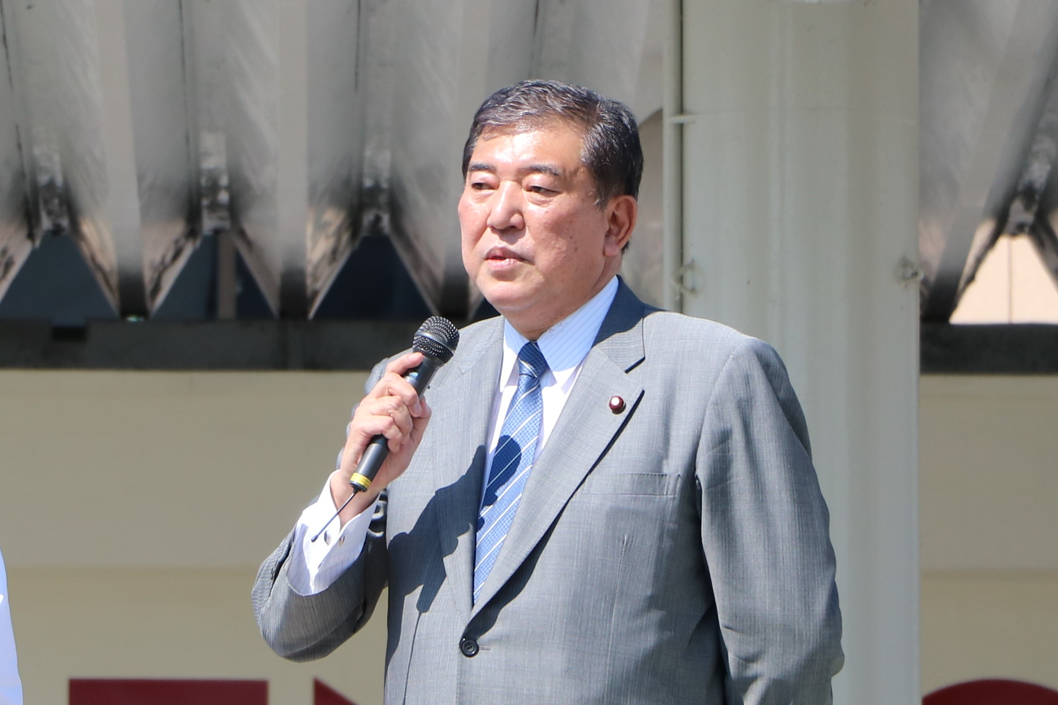 石破茂（2017年9月25日。山梨市市長選応援演説にて撮影）